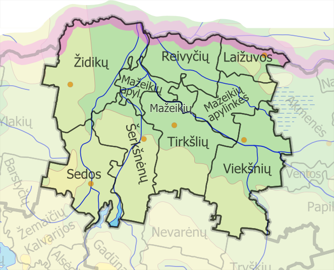 Padaryta iš :image:LietuvosSeniunijos.png